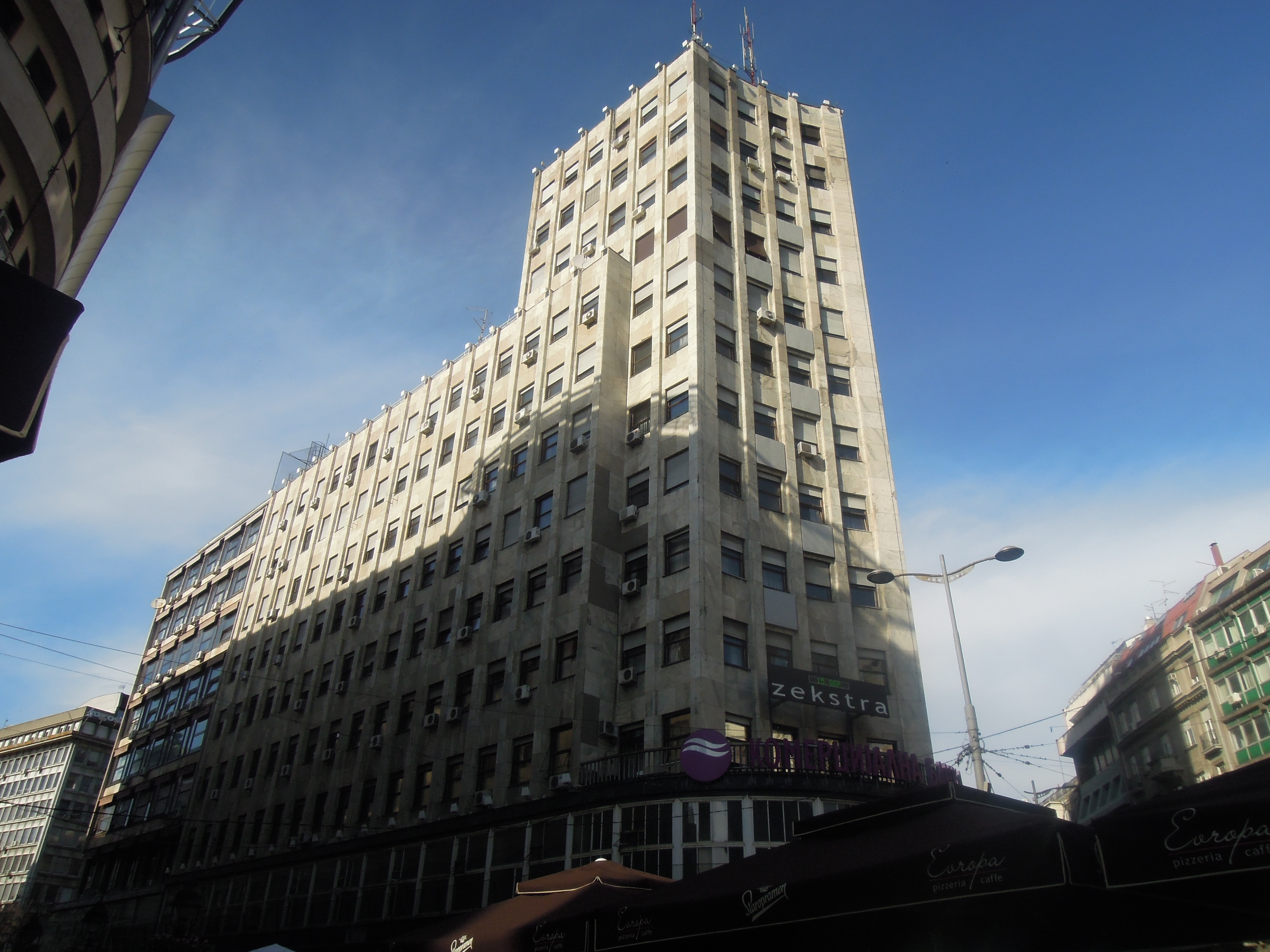 Palata Albanija.